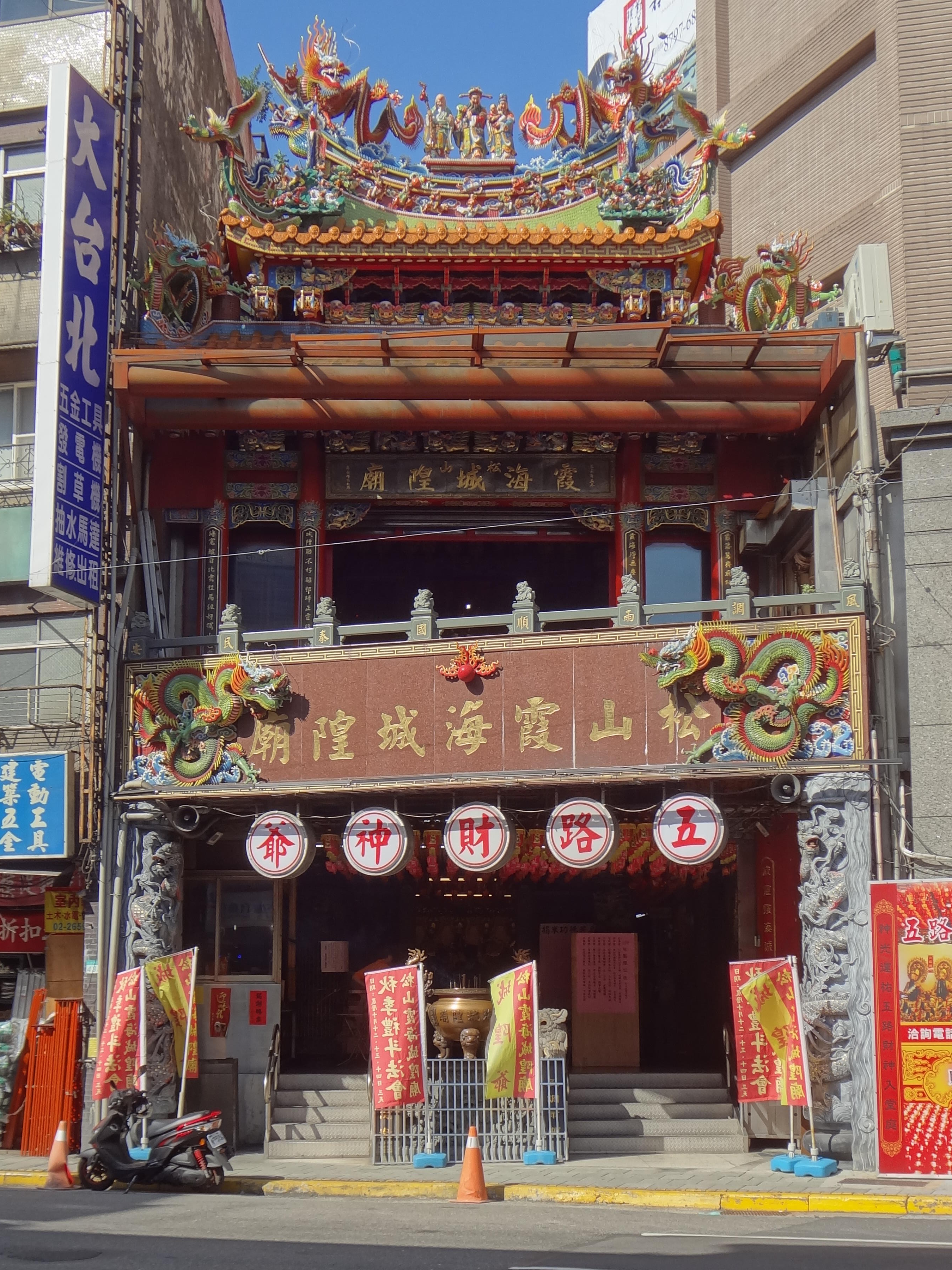 松山霞海城隍廟，地址：臺北市松山區八德路四段439號。